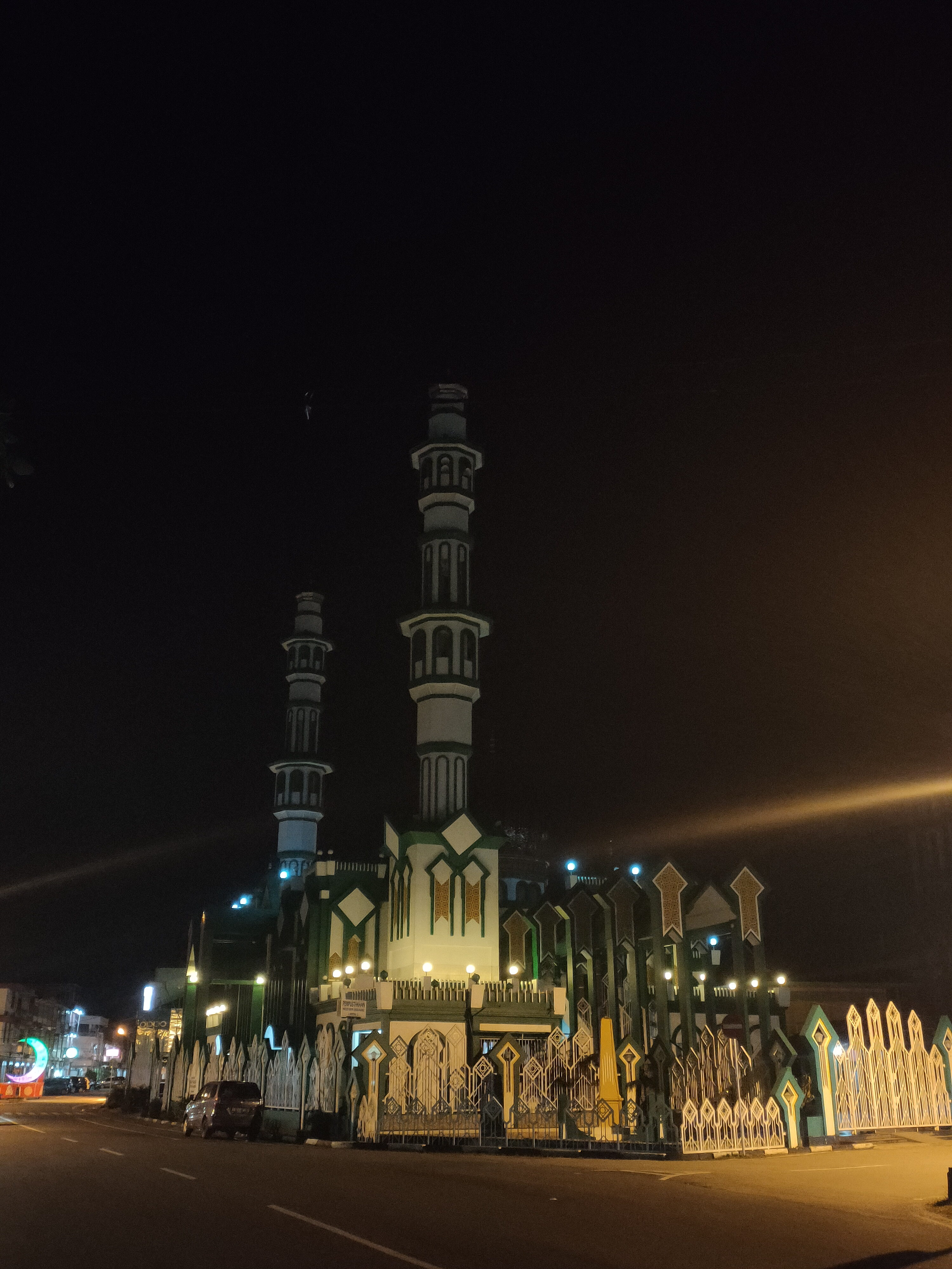 Suasana malam hari Masjid Raya Kota Singkawang, Kalimantan Barat